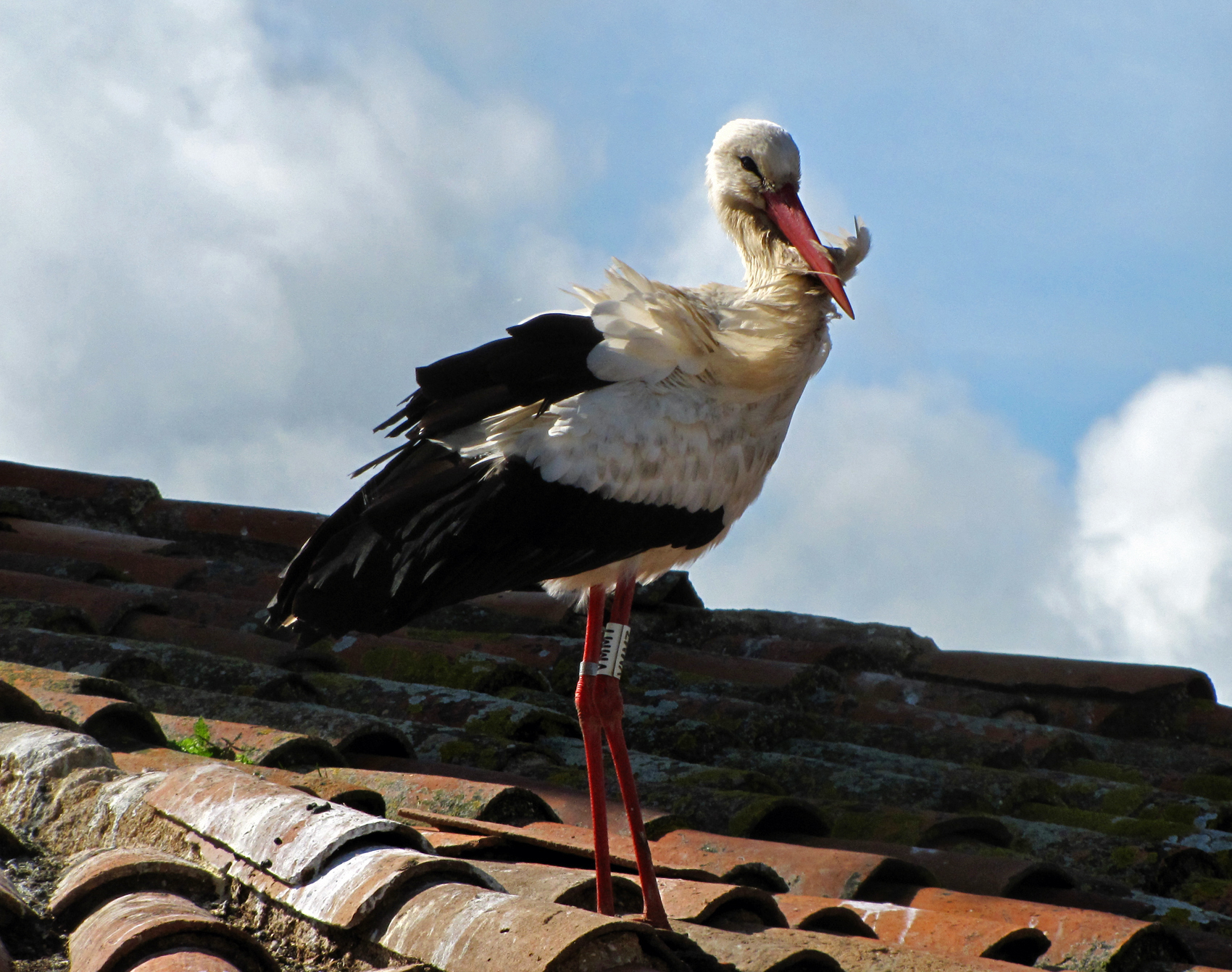 Cigüeña sobre uno de los tejados del conjunto monumental de la ciudad de Cáceres.